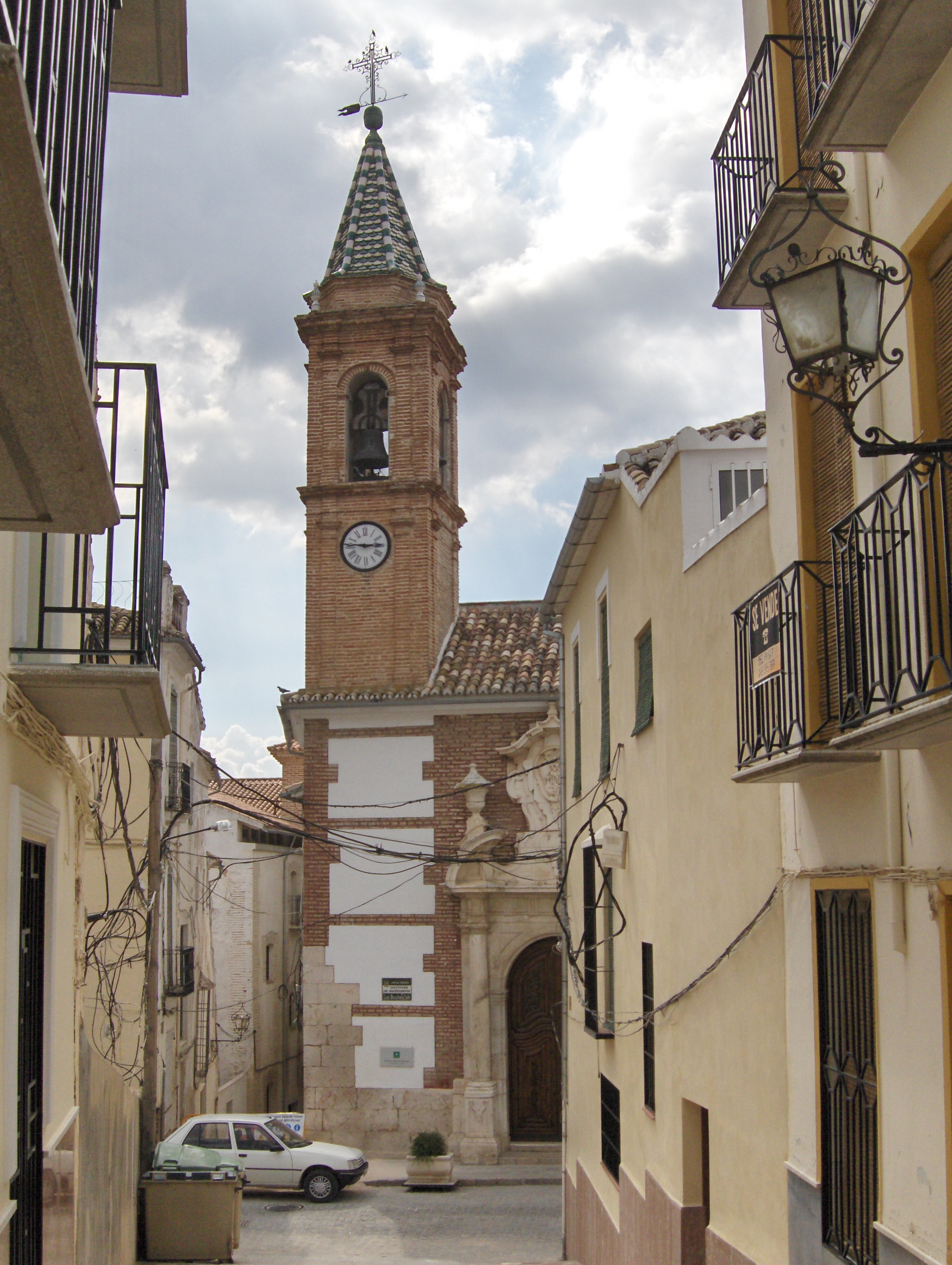 Iglesia de Jesús Nazareno, Archidona, Málaga, Spain.